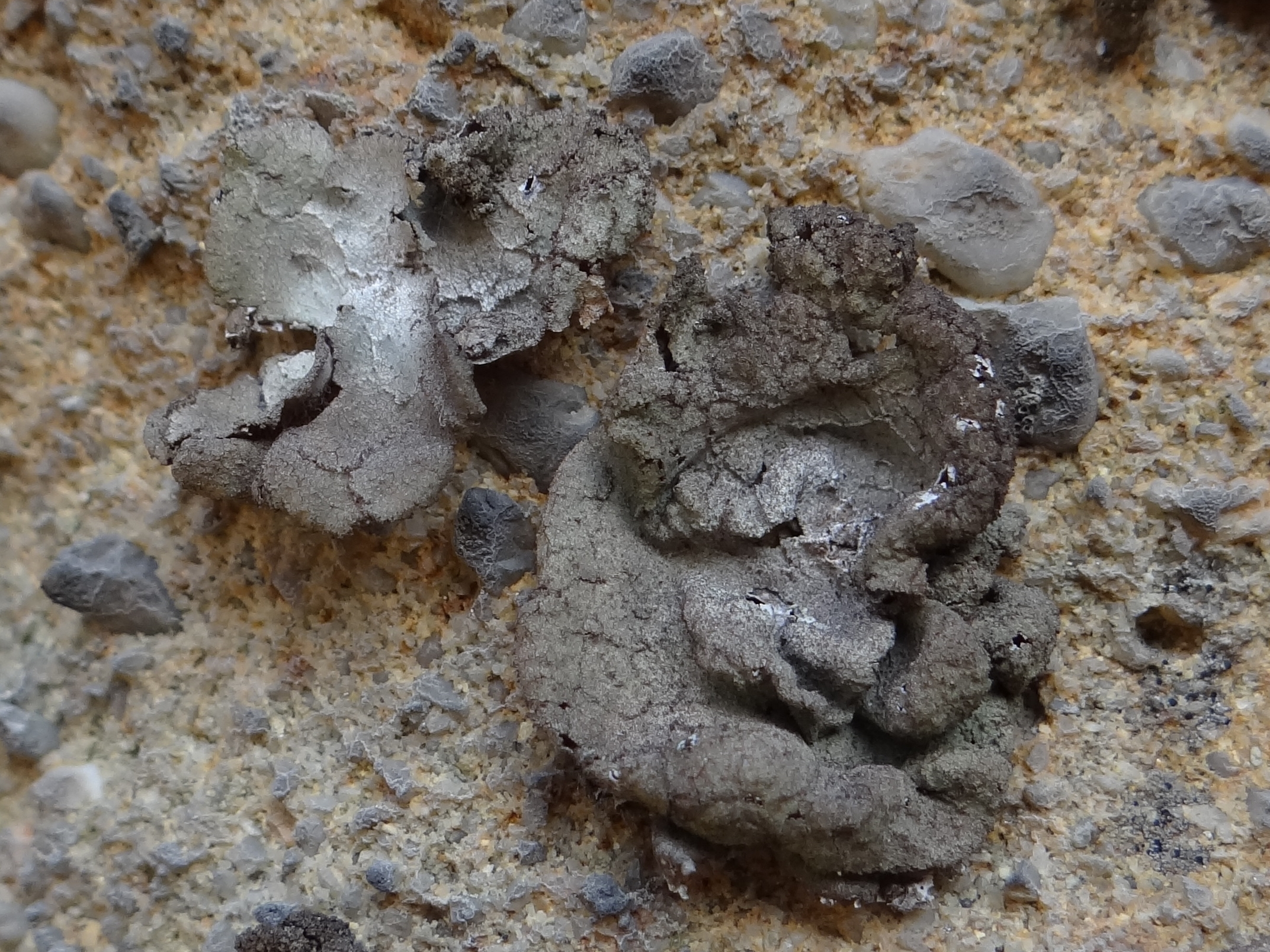 Umbilicaria hirsuta (location: Poland, Ciężkowice, Skamieniałe Miasto)